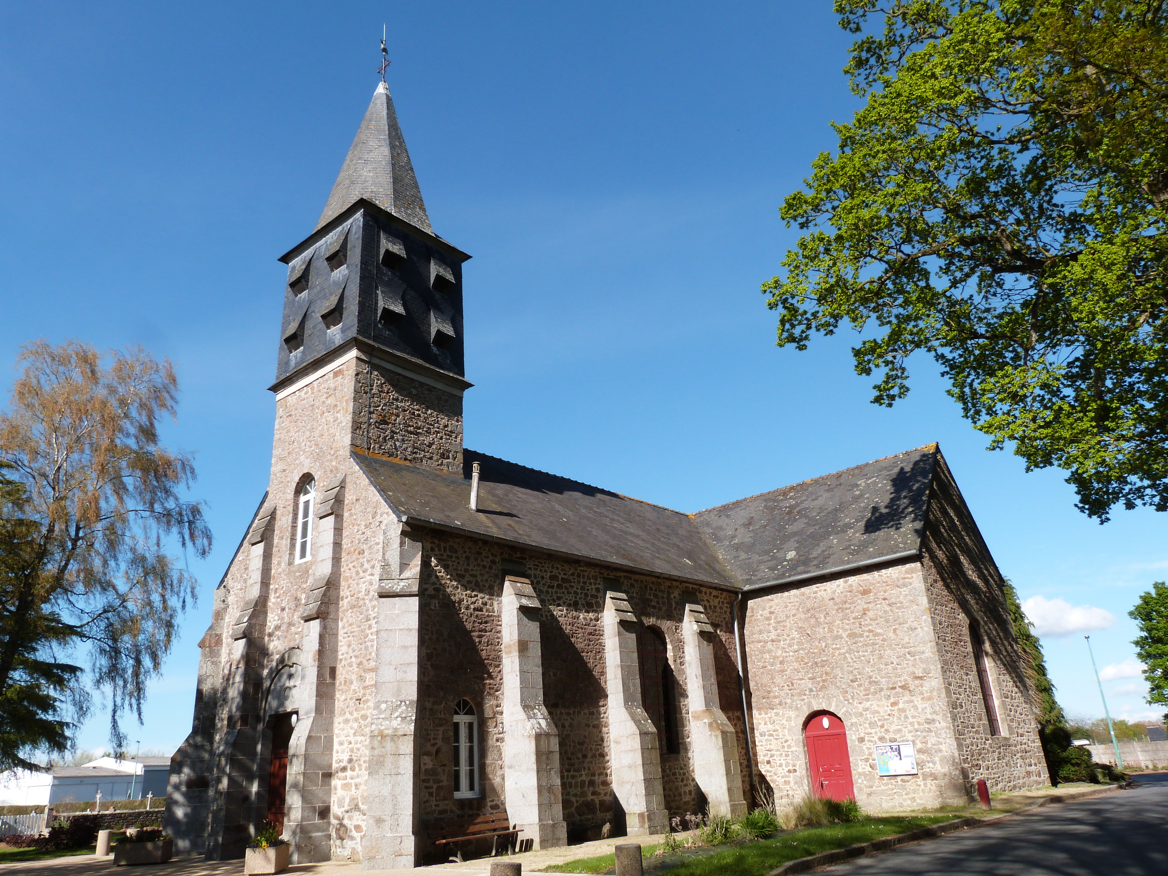 Eglise Saint-Théodule à Penguily